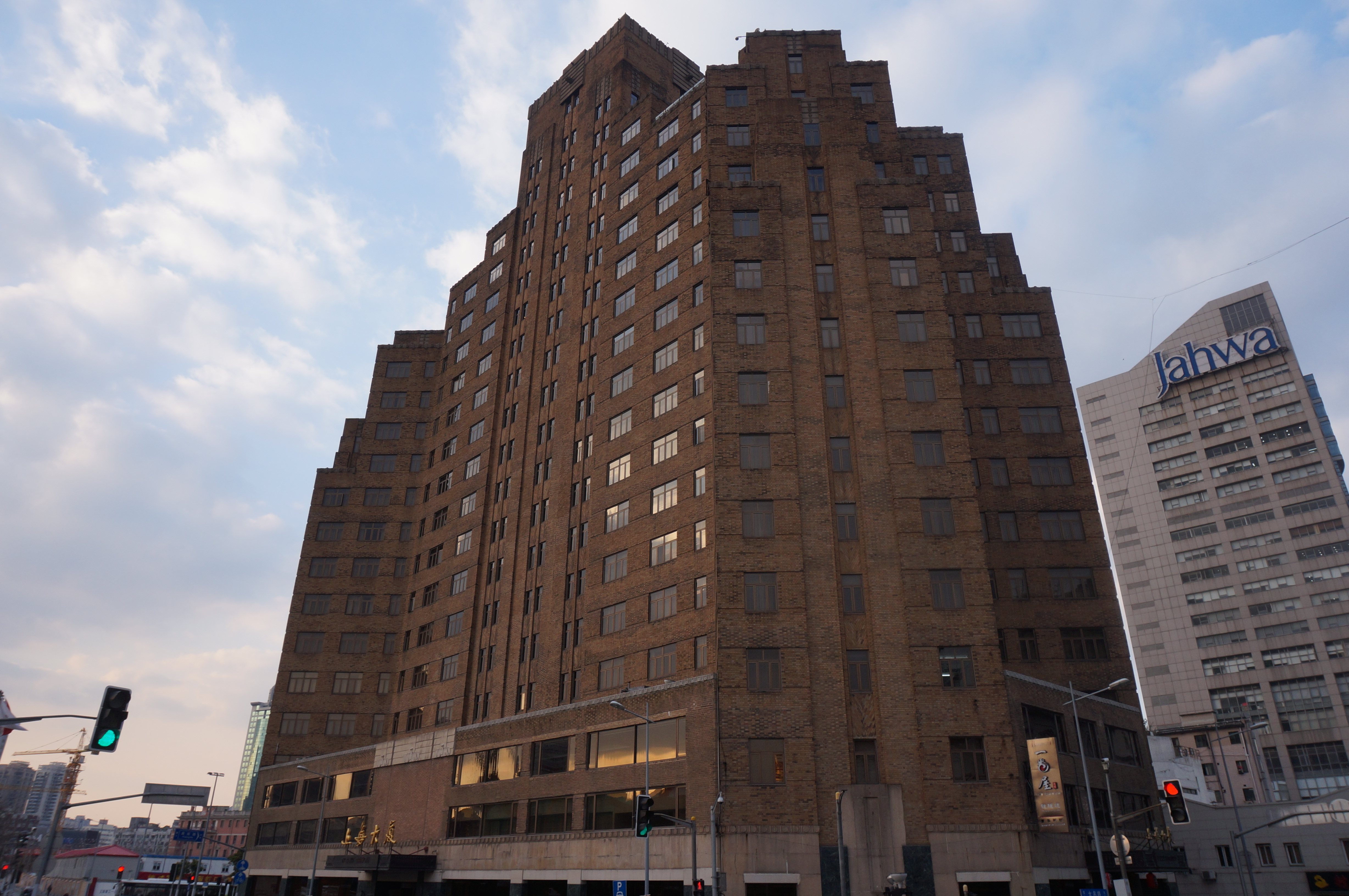 上海大厦近景